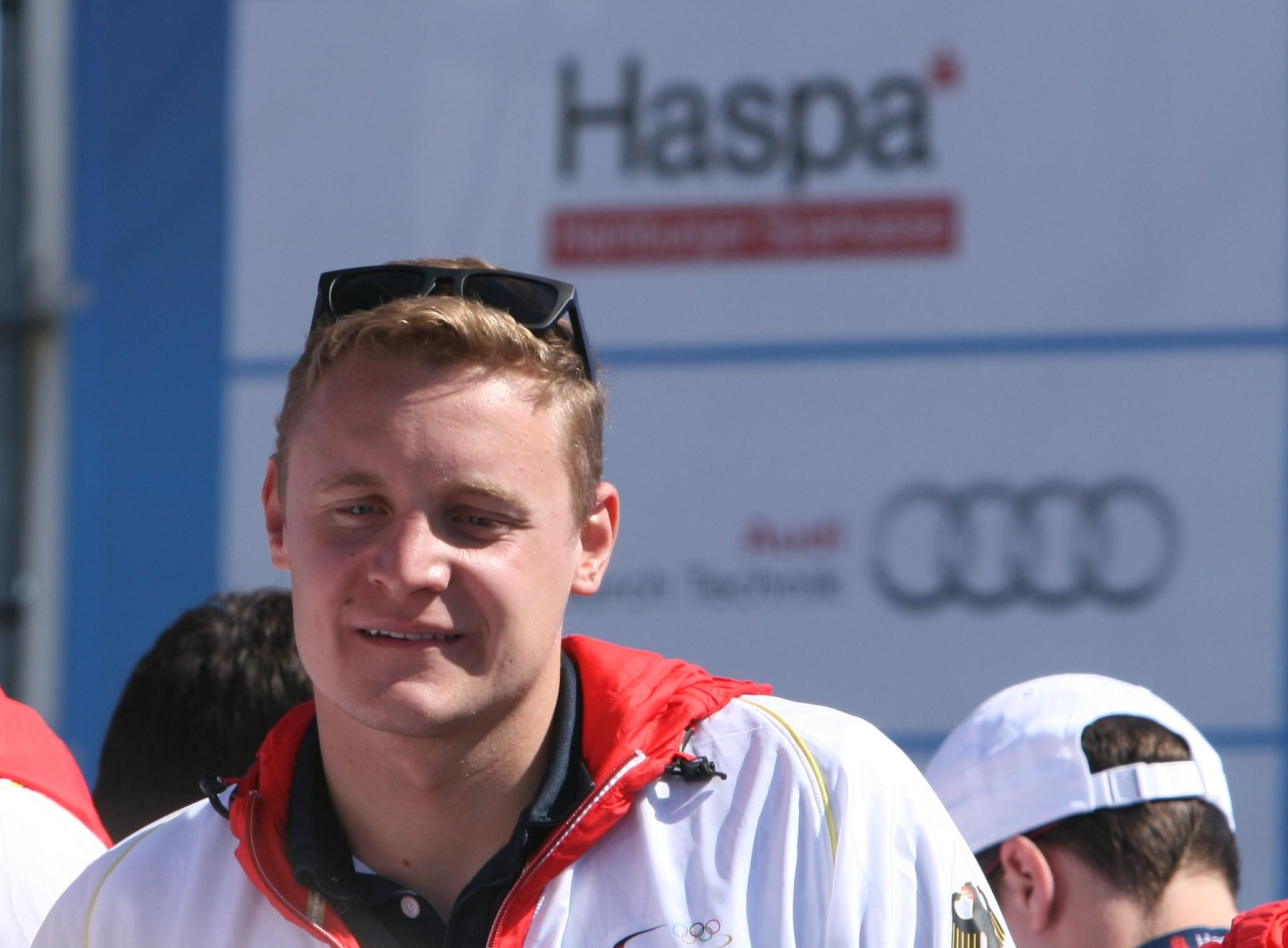 Dimitri Colupaev beim Empfang der Olympioniken 2012 in Hamburg